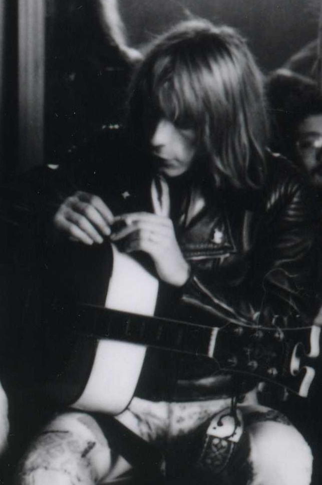 Renaud au Printemps de Bourges en 1978.